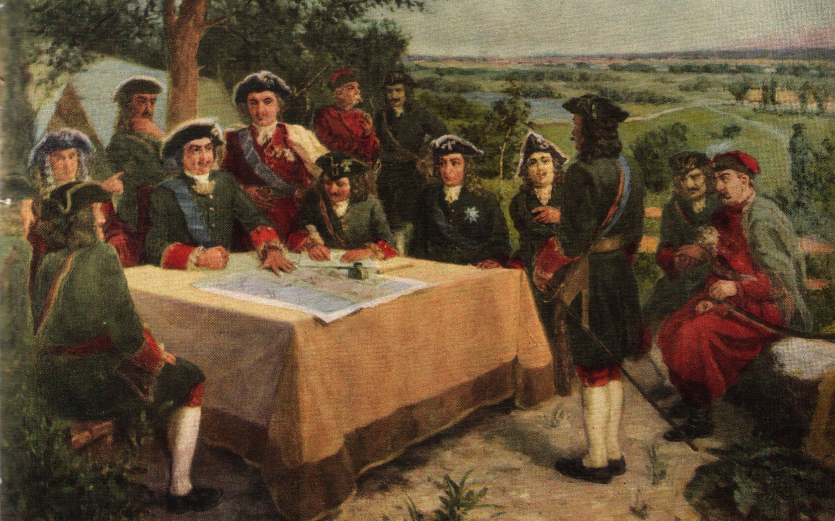 Военный совет в деревне Крутой Берег. Художник Е. Любимов